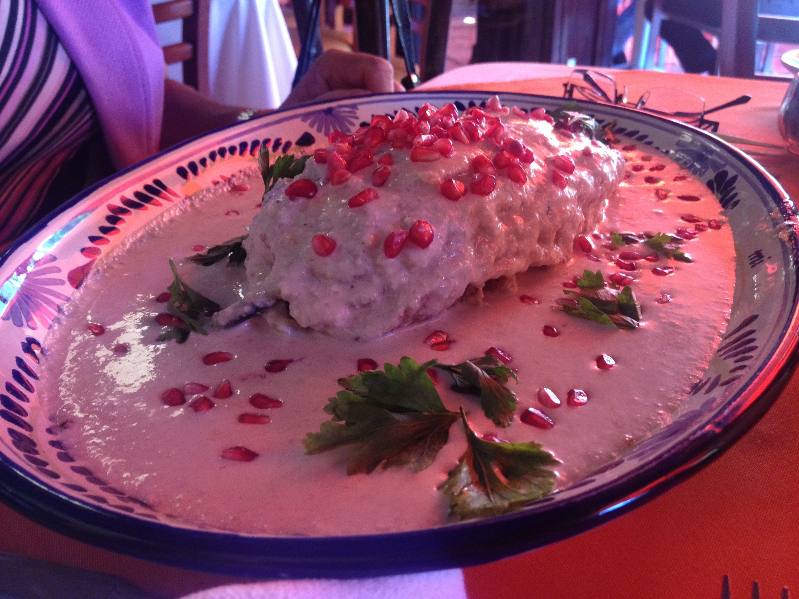 Chile en nogada, platillo típico de Puebla